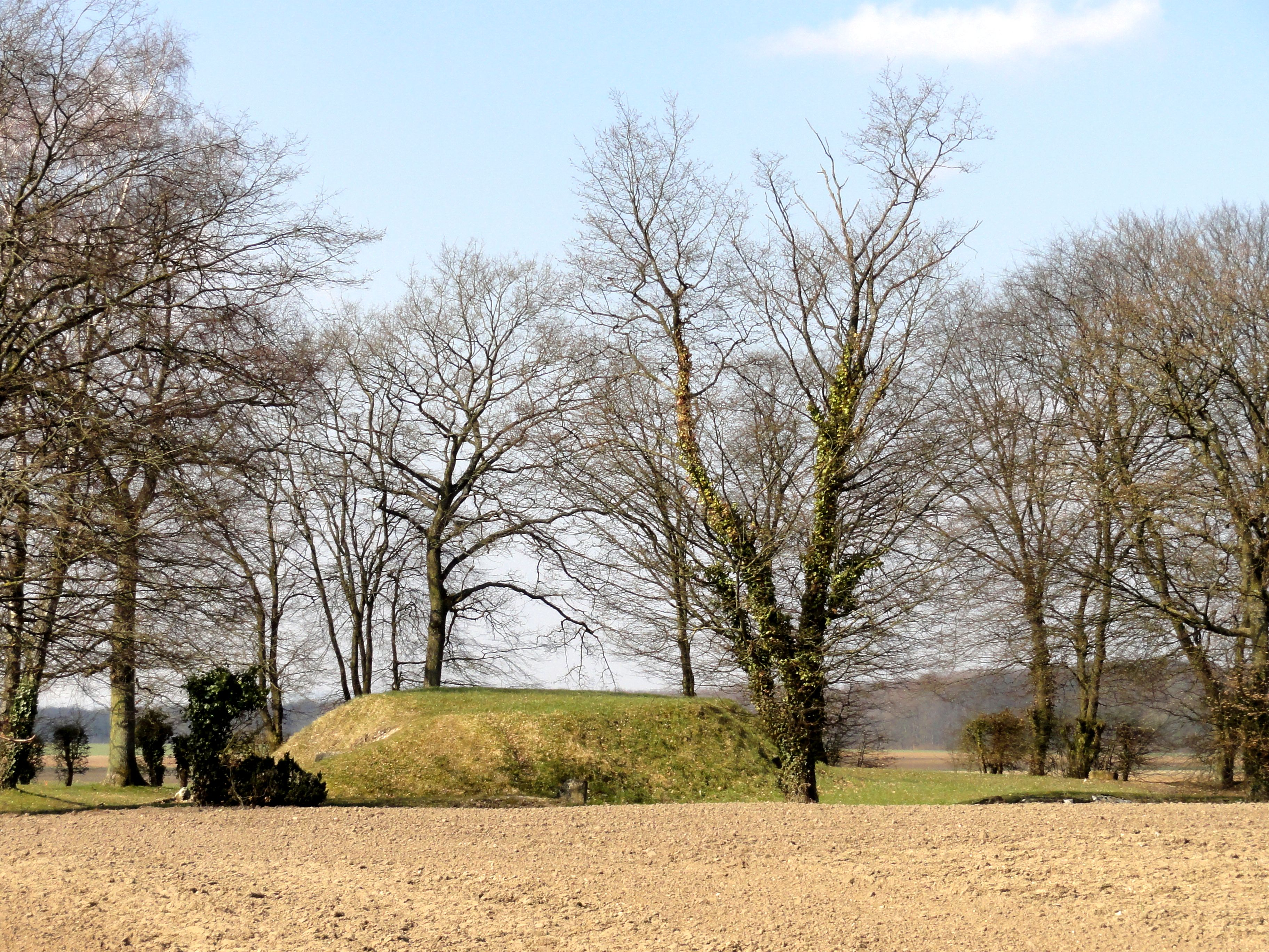 Vue d'ensemble du temple depuis l'est.